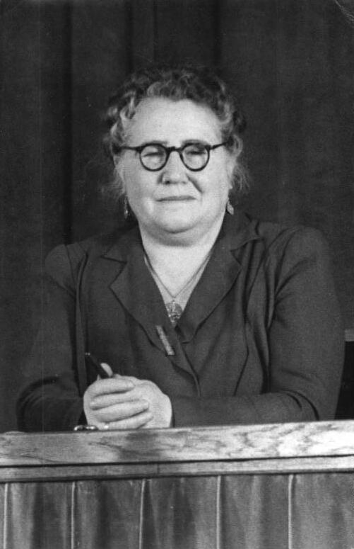 Illus Sturm 15.11.1950 Kno.-Jst. II. Sitzung der Volkskammer am 15.11.1950. UBz: Frau Schirmer-Pröscher, Beisitzerin der Volkskammer der DDR und Mitglied des demokratischen Magistrates von Groß-Berlin. Leihweise Illus Berlin W 8